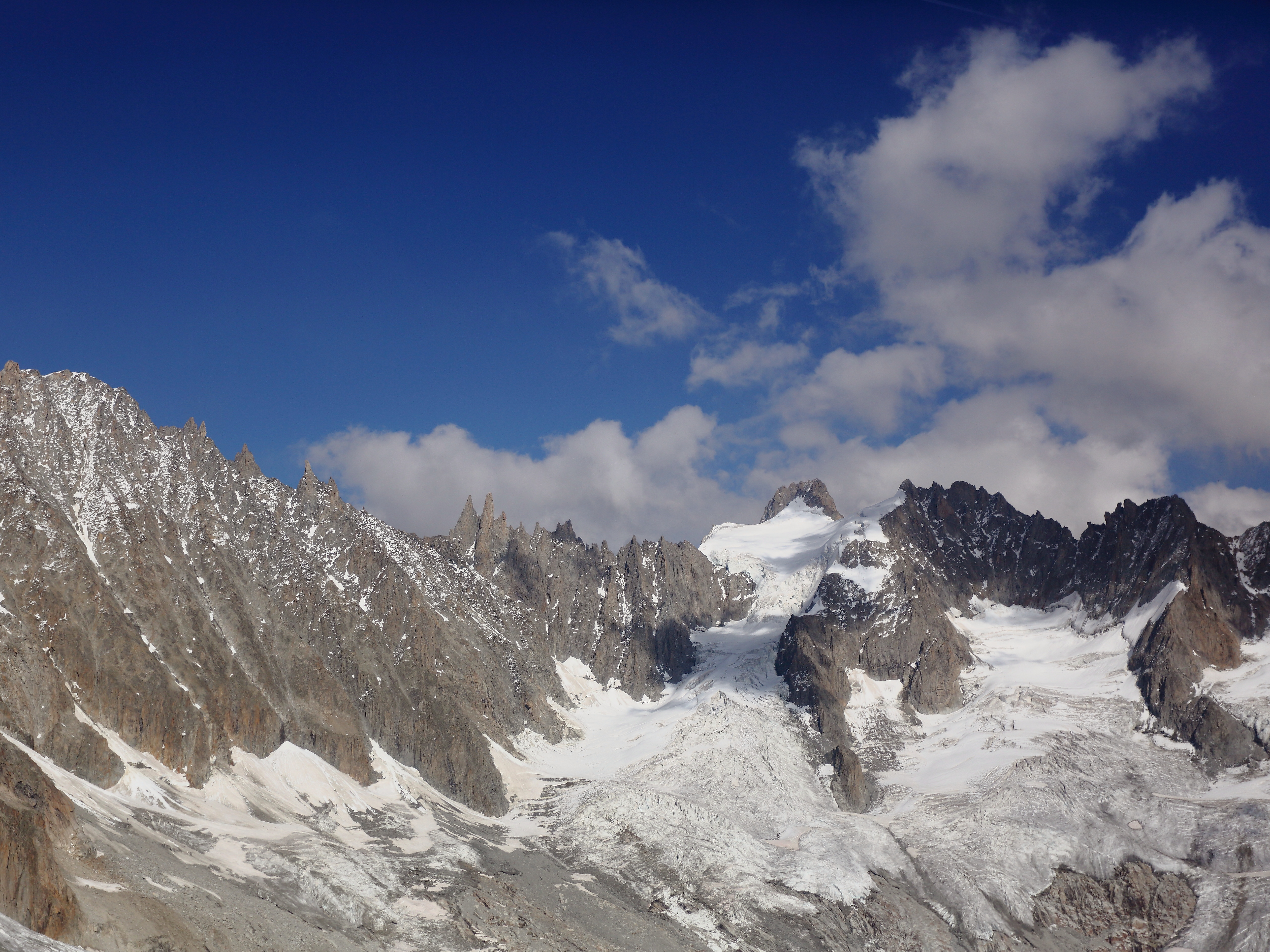 Vue des Courtes (à gauche) et de l'aiguille du Triolet au fond